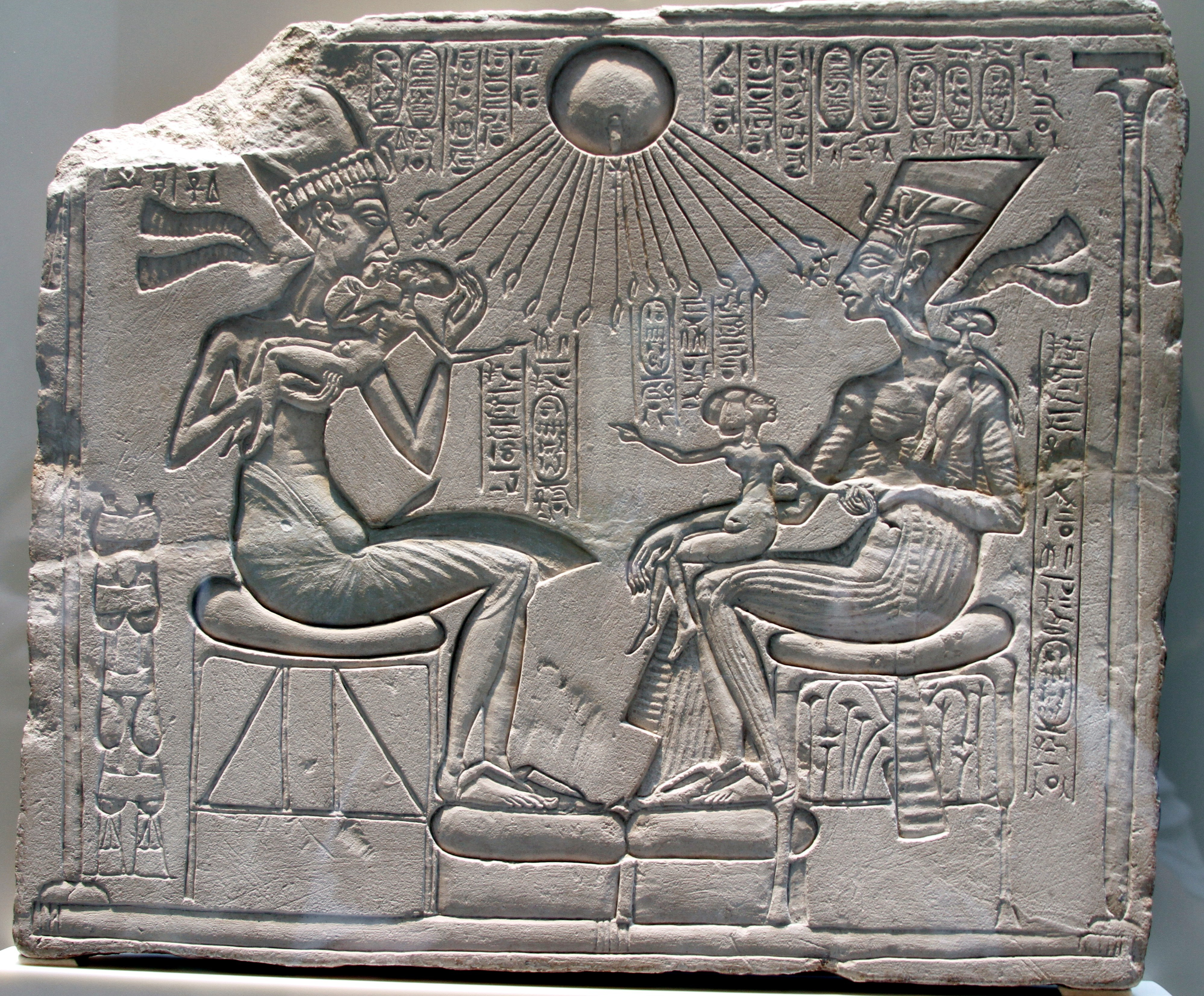 Neues Museum - Berlin - Germany